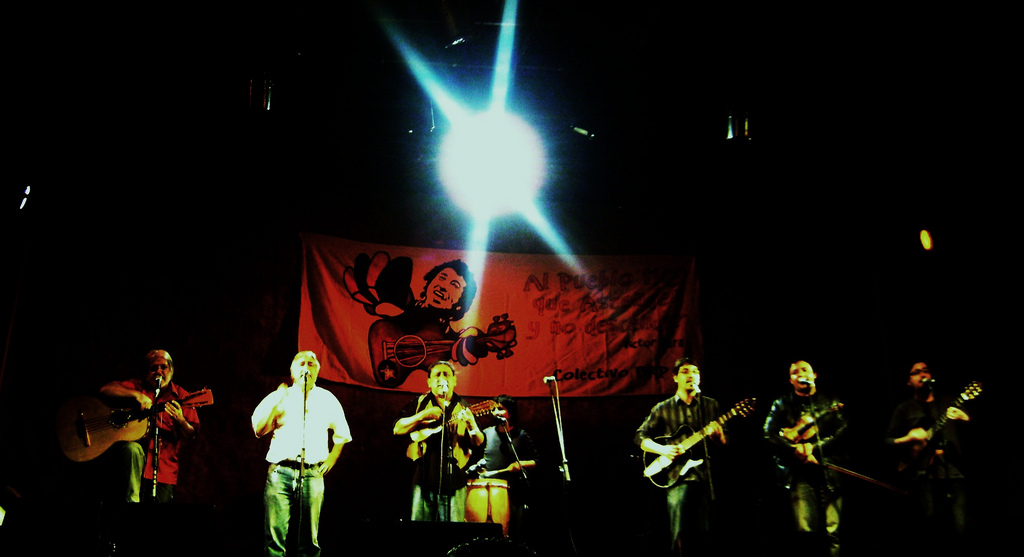 Inti-Illimani tocando en el "Galpón Víctor Jara" el 16 de septiembre. (por la recuperación de la libertad de crear y difundir las artes)